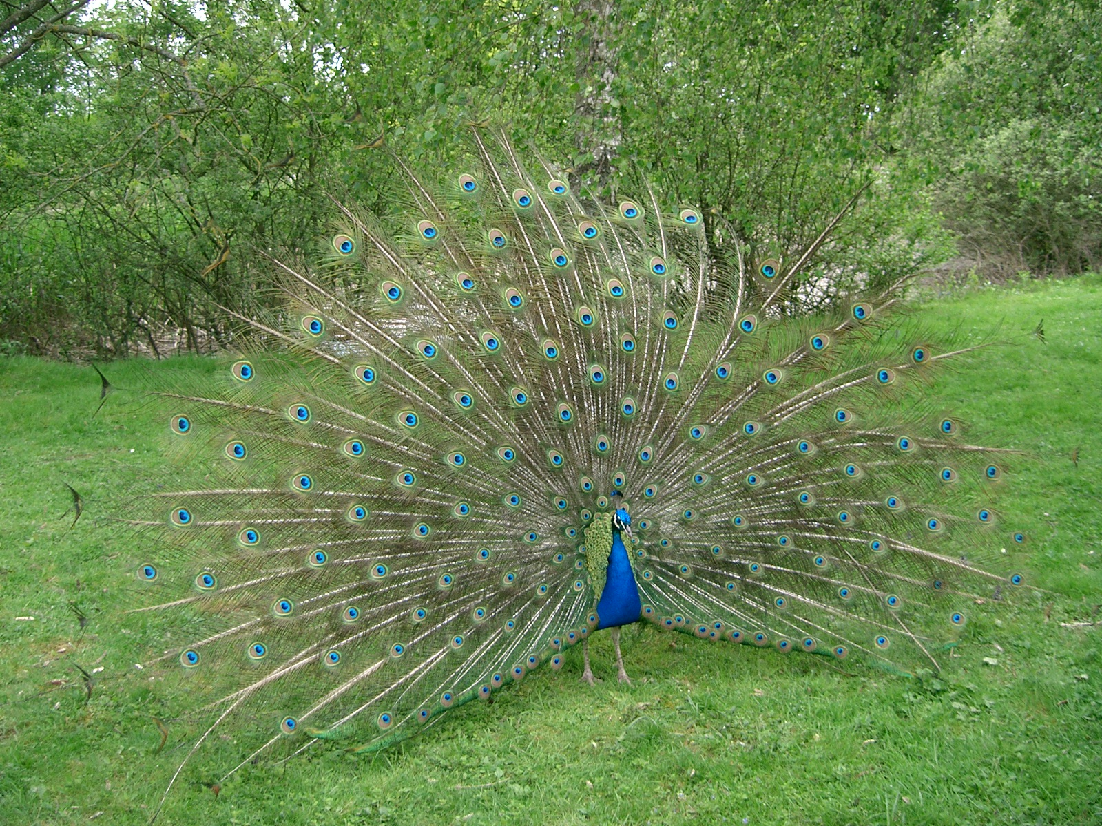 Paon bleu faisant la roue